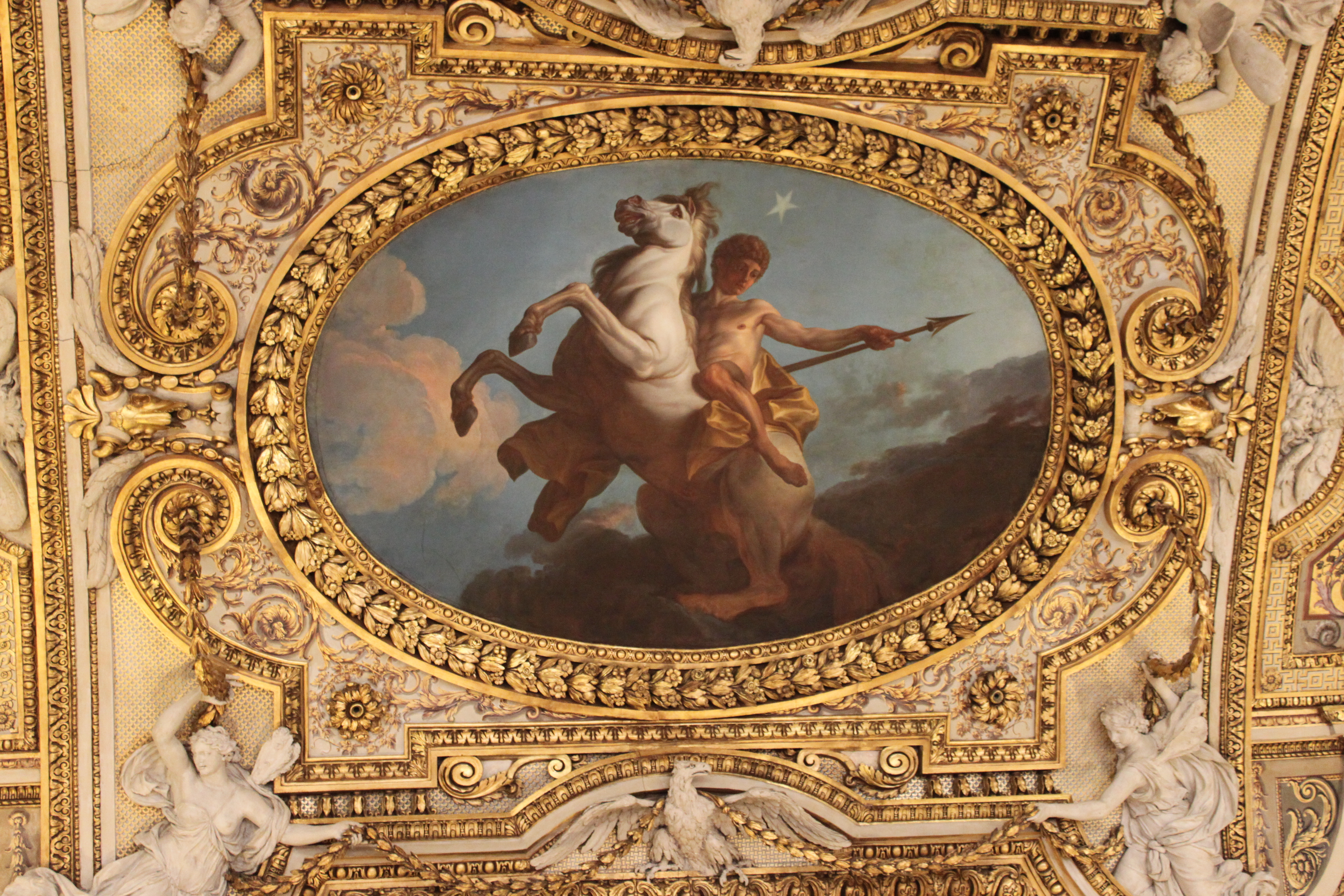 L'Etoile du matin ou Castor par Antoine Renou Compartiment de forme ovale, au plafond de la Galerie d'Apollon, Musée du Louvre, Paris. Morceau de réception à l'Académie, 1781. Salon de 1781.